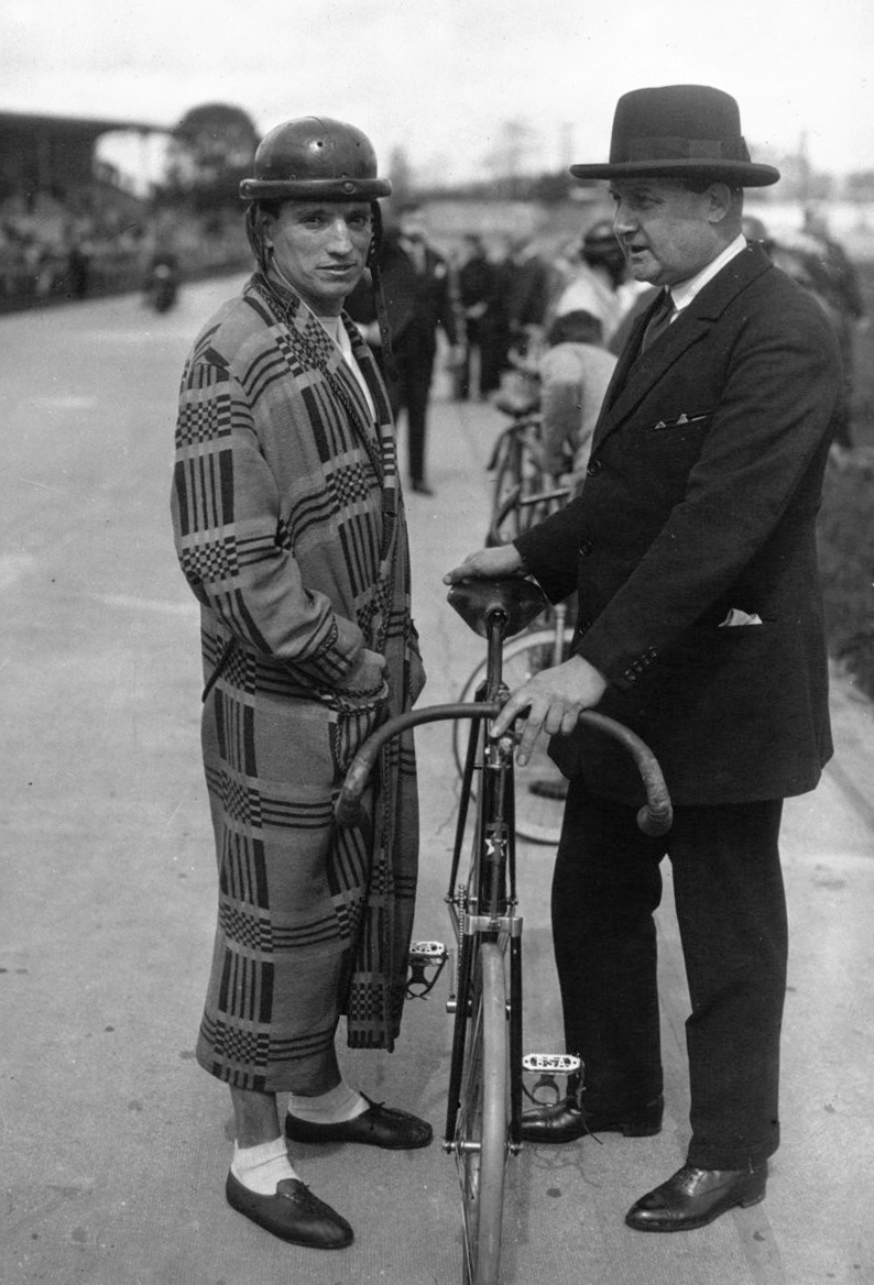 Charles Lacquehay lors du championnat de France de demi fond 1931 au Parc des Princes